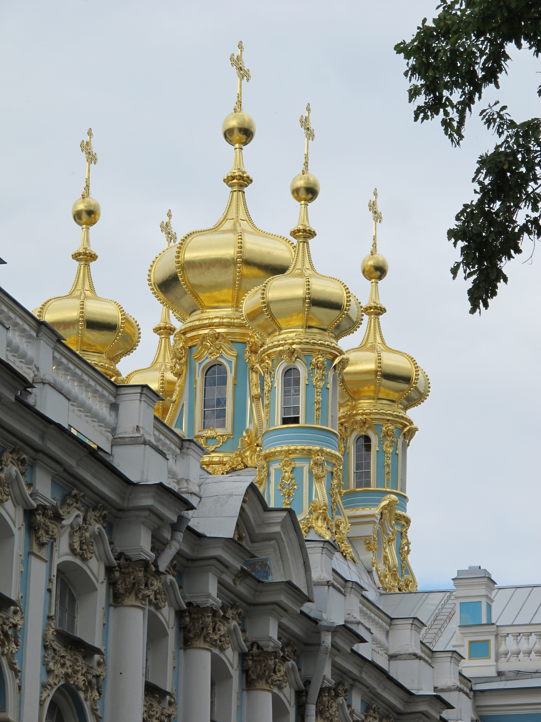 Tsarskoe selo, ext